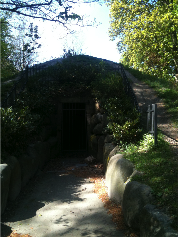 Mindehøjen i Søndermarken set udefra.En høj fra 1925 i Søndermarken i København til minde om dansk-amerikanere i USA